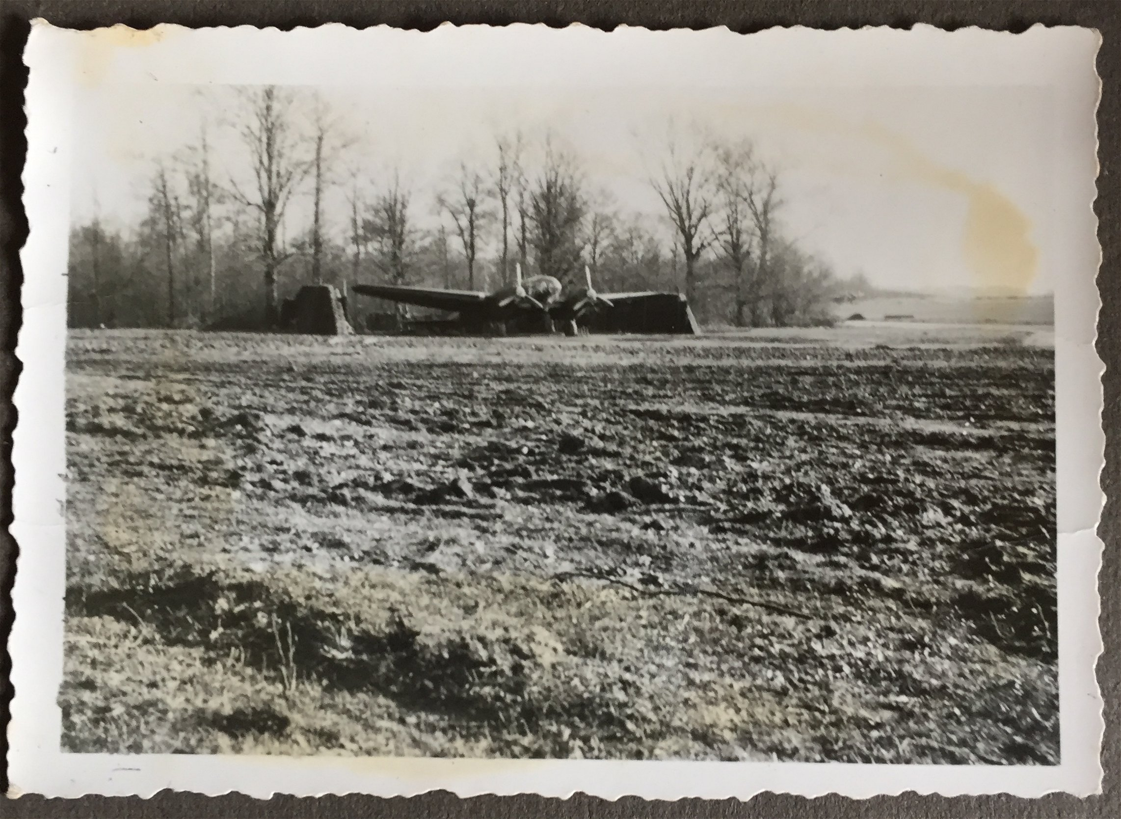 HE-111 getarnt auf Feldfluplatz Nordfrankreich (1940)